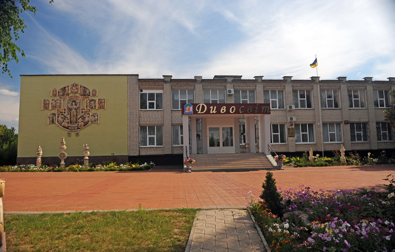 Гимназия Дивосвит